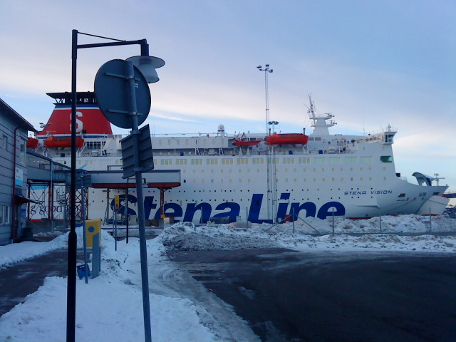 Stena Vision i sin hemmahamn Baltic Sea Ports ,Karlskrona.